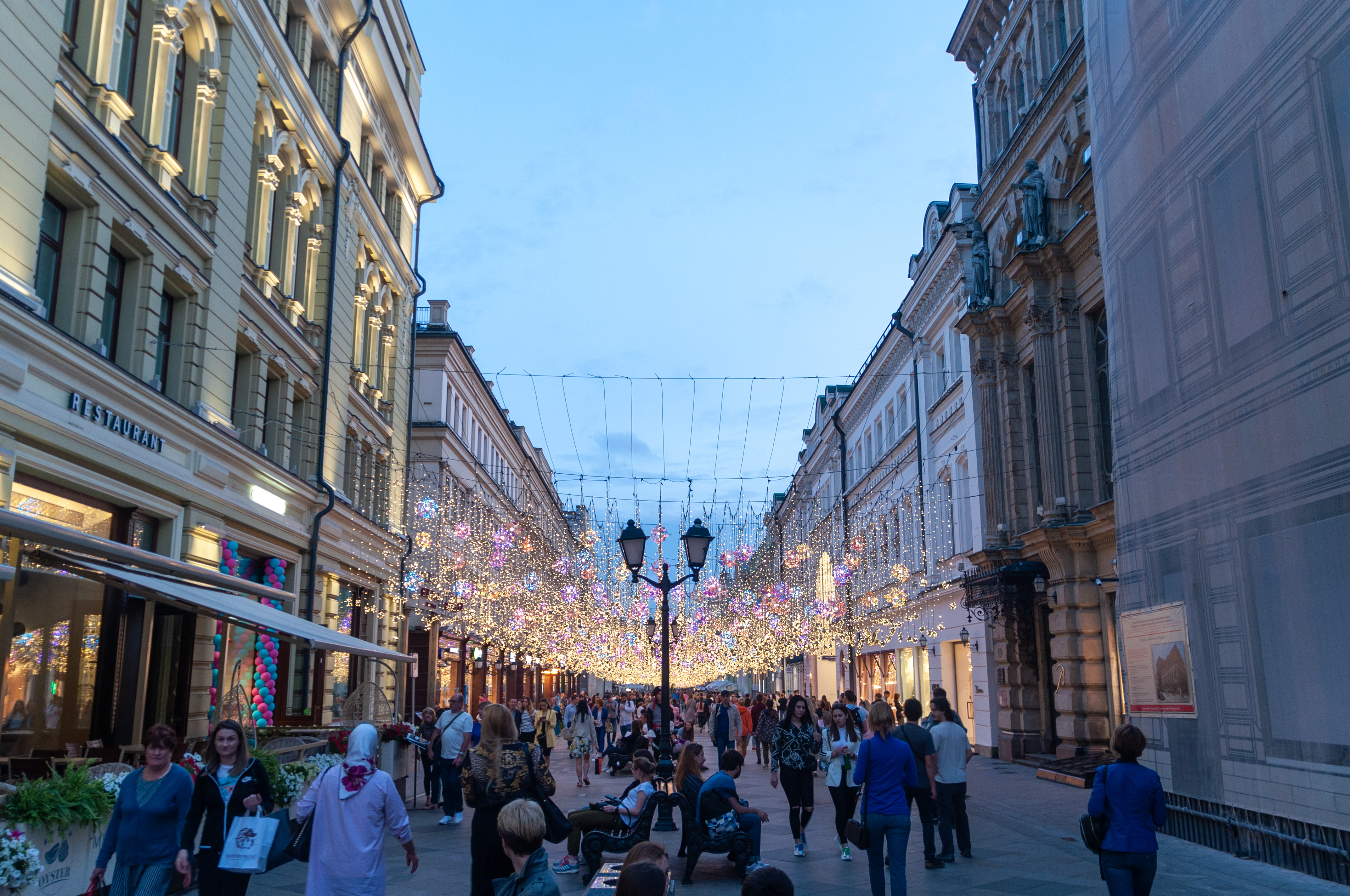 Rue Nikolskaya qui relie la place Lubyanka à la place Rouge